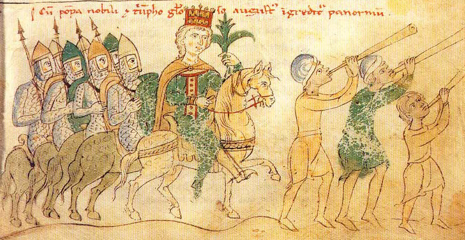 Triumf Jinddřicha VI. Štaufského